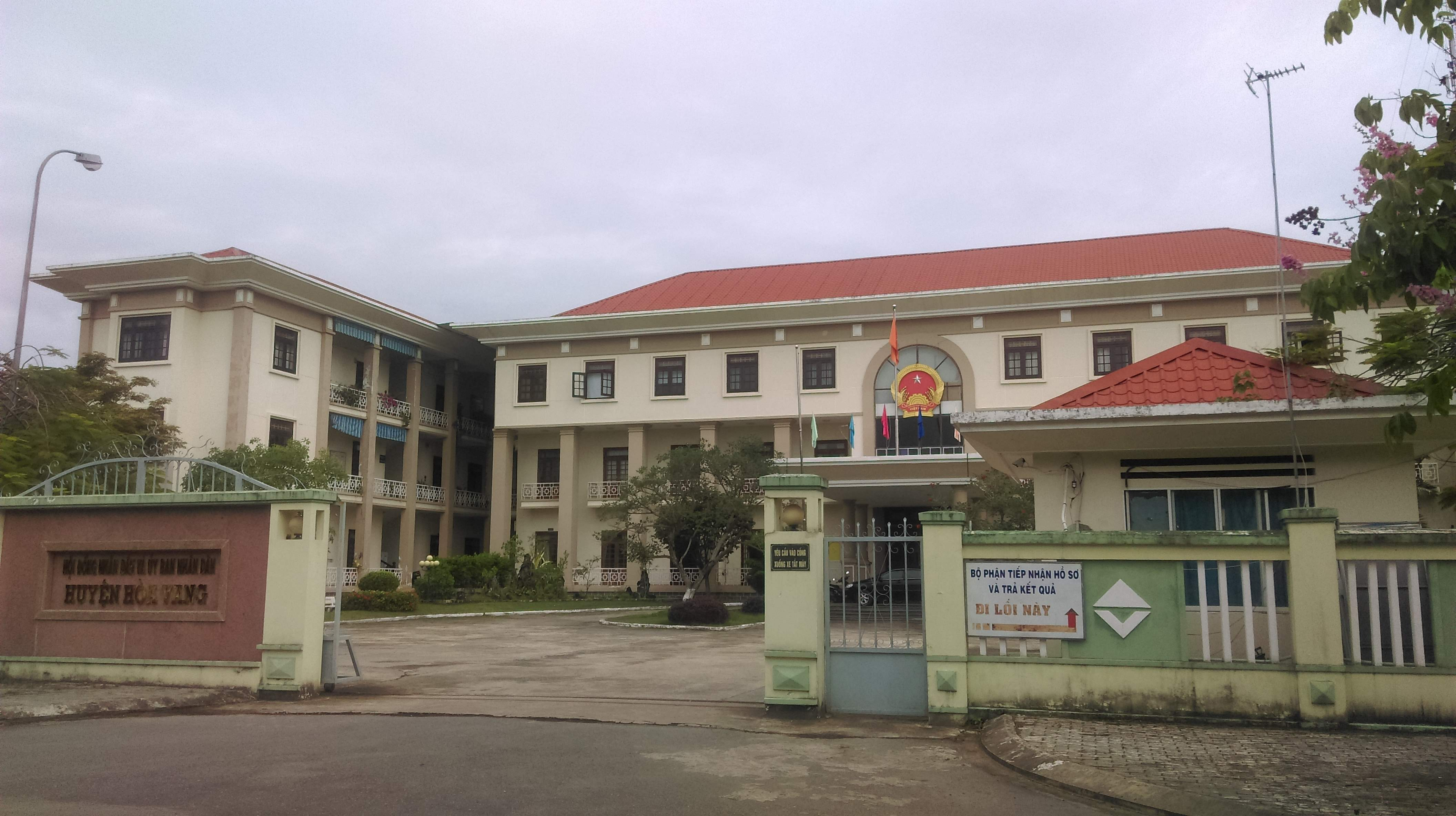 UBND huyện Hòa Vang